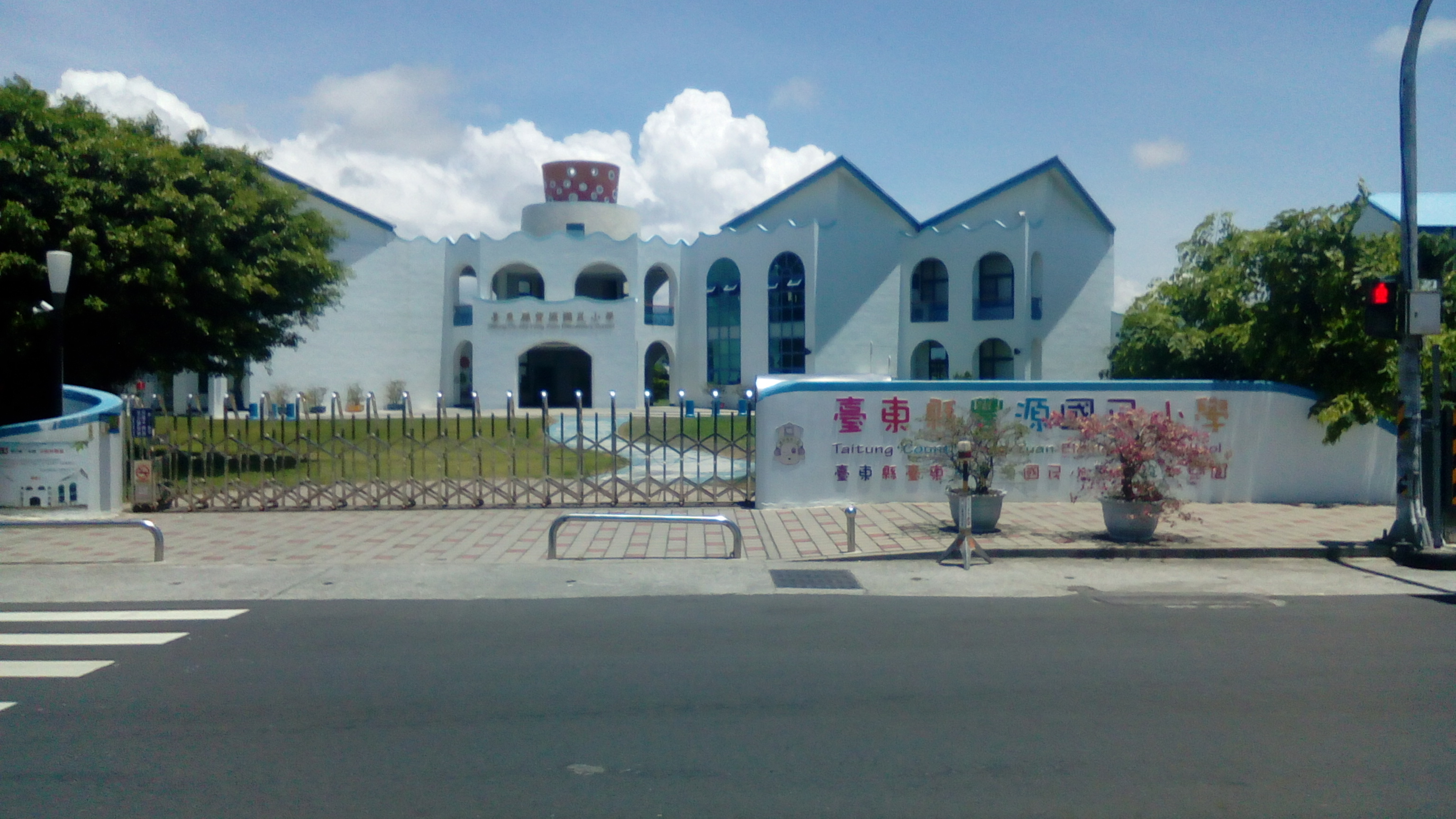 台東豐源國小中華路四段校門口